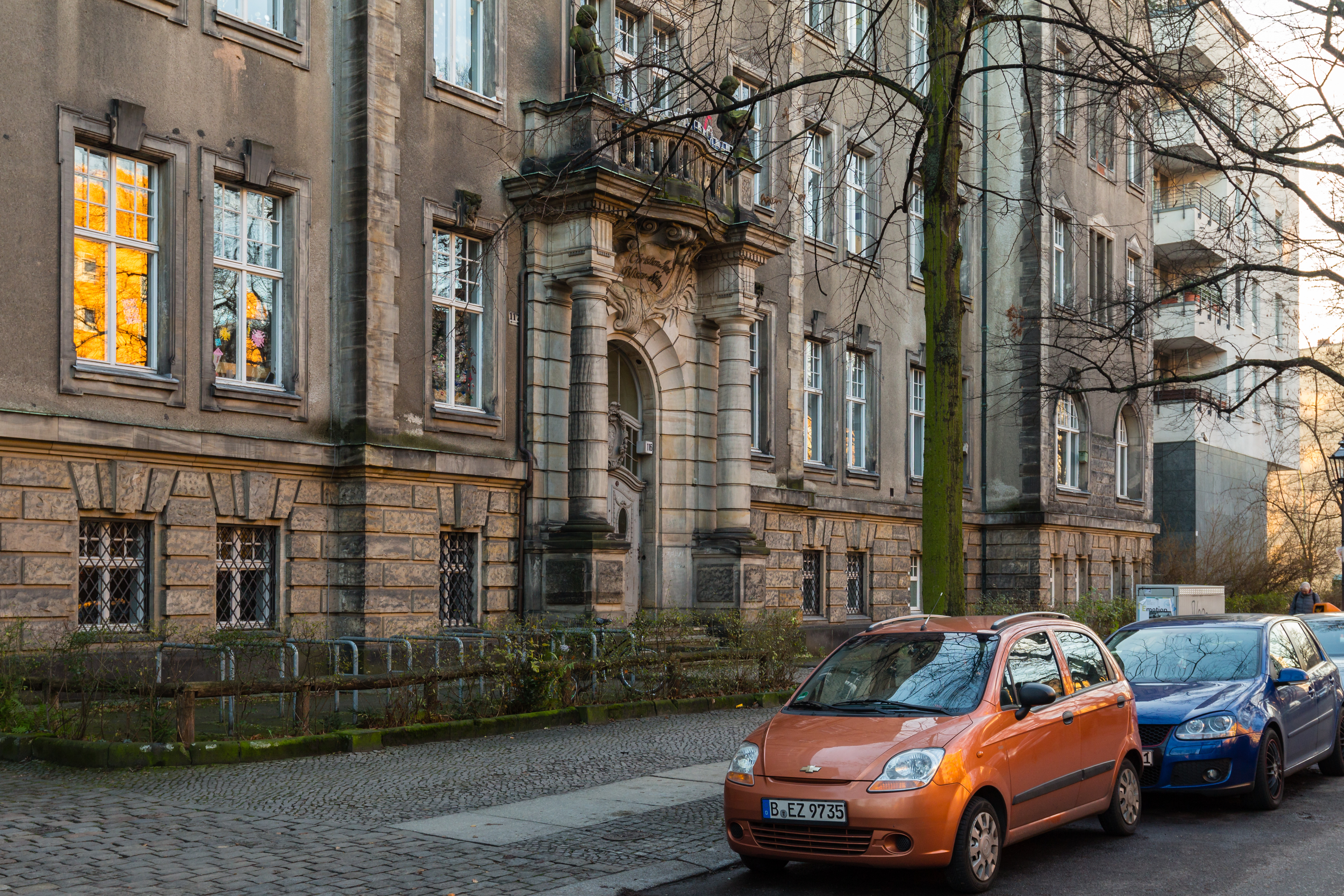 Comenius-Schule in der Wilhelmsaue in Berlin-Wilmersdorf